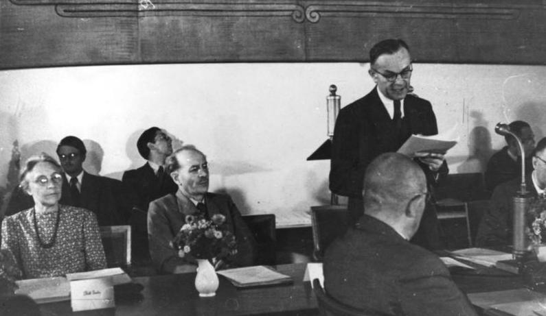 Zentralbild Zum ersten Mal nach dem Zusammenbruch hatten sich die Ministerpräsidenten und Vertreter der deutschen Länder, mit Ausnahme der 5 Ministerpräsidenten der sowjetischen Besatzungszone gemeinsam an einen Konferenztisch gesetzt, um die für die deutsche Zukunft bedeutungsvollen wirtschaftlichen und politischen Fragen zu erörtern. Die Vertreter der Länder der sowjetischen Besatzungszone stellten den Antrag, zuerst folgende Frage zu beraten: Bildung einer deutschen zentralen Verwaltung durch Verständigung der demokratischen Parteien und Gewerkschaften zur Schaffung des deutschen Einheitsstaates. Sie erklärten, daß nur eine Volksabstimmung über die Neugestaltung Deutschlands entscheiden kann. Dieser Antrag wird von den westlichen Vertretern abgelehnt. Daraufhin lehnen die Vertreter der Länder der sowjetischen Besatzungszone die Teilnahme ab. Die Konferenz fand am 6. und 7. Juni 1947 unter Vorsitz des bayrischen Ministerpräsidenten Dr. Ehard in München statt. UBz: Ministerpräsident Dr. Ehard während seiner Ansprache. V.l.n.r.: Berlins stellvertretende Oberbürgermeisterin, Frau Louise Schröder - der stellvertretende Ministerpräsident von Bayern, Dr. Högener und Bayerns Ministerpräsident Dr. Ehard.